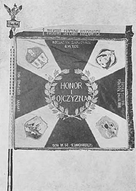 Chorągiew 1 Pułku Saperów Kolejowych (1927, prawa strona)